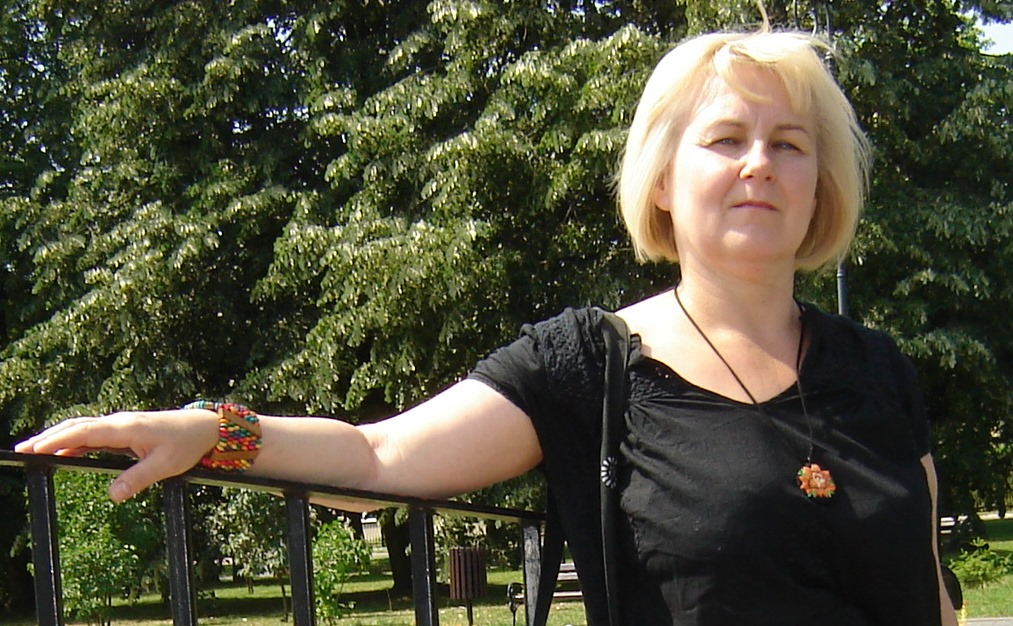 Dorota Krystyna Rembiszewska